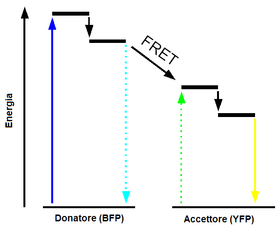 Prospetto energetico durante un processo di FRET